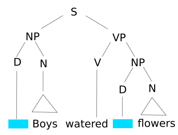 Sentence tree